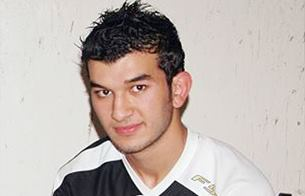 Photo du joueur du CSSfaxien